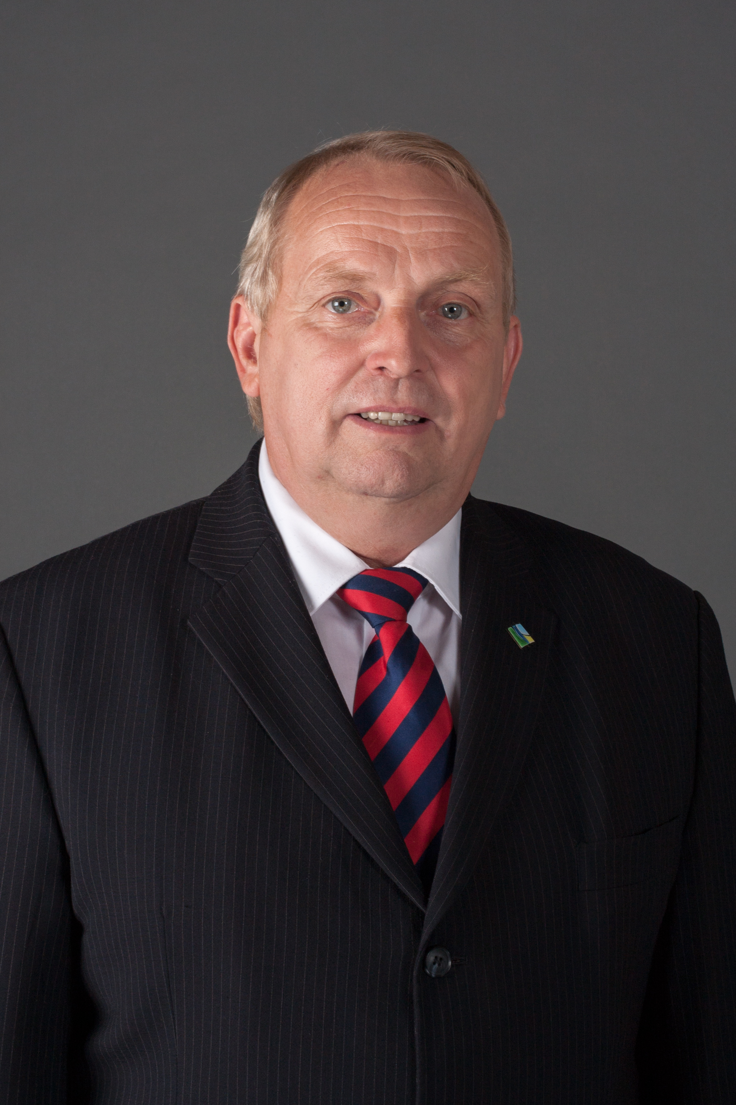 Till Backhaus, SPD Landwirtschaftsminister Mecklenburg-Vorpommern